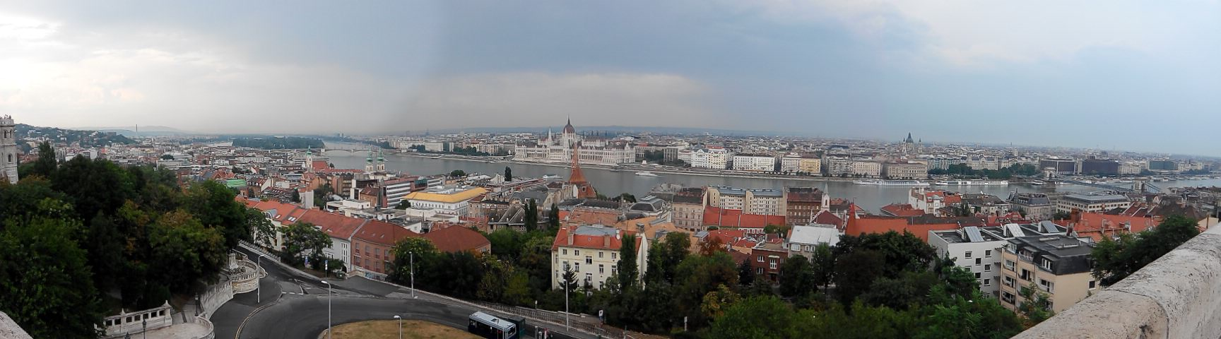 中文（台灣）: 布達佩斯多瑙河